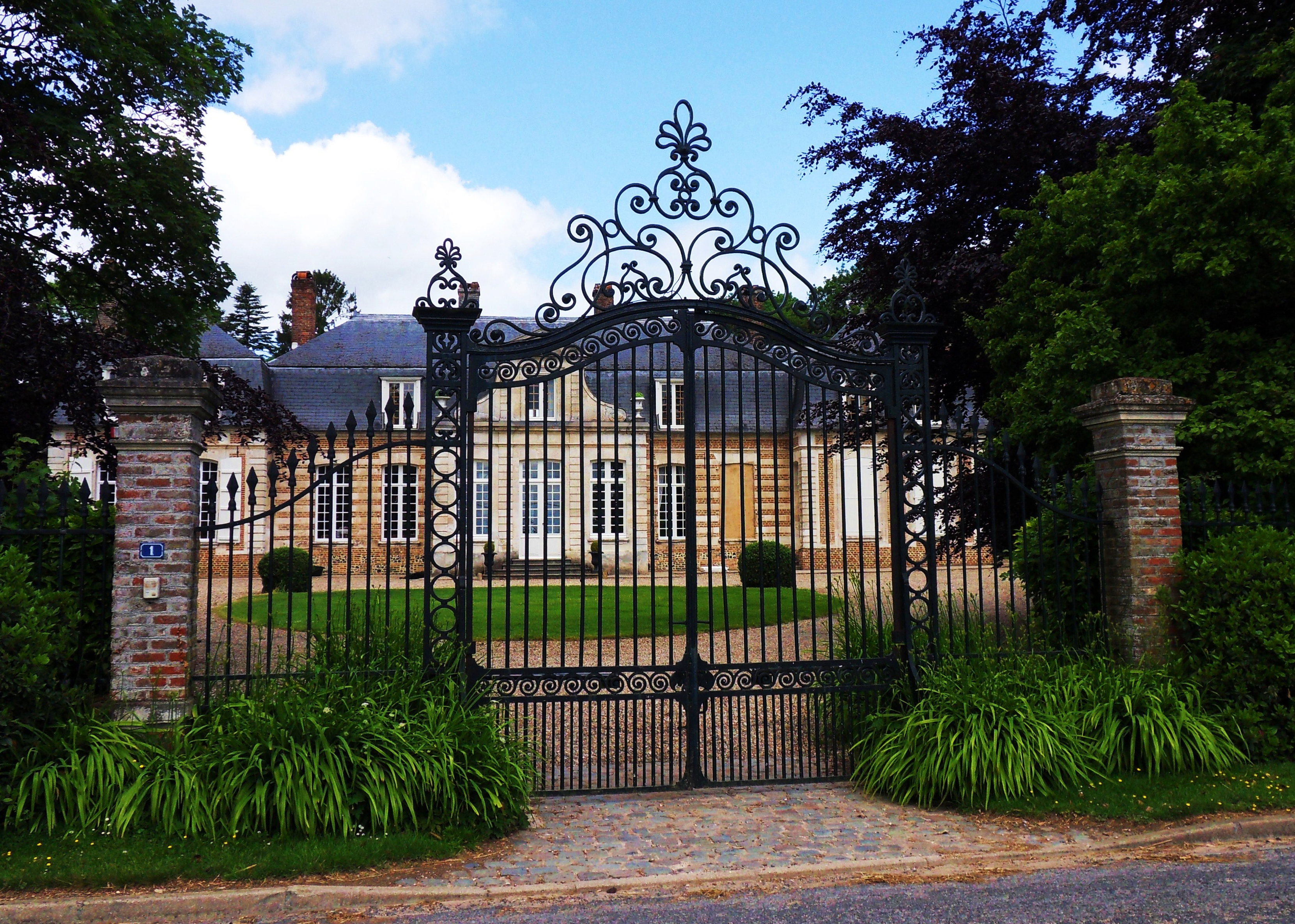 Fransu (Somme, France). Le château.